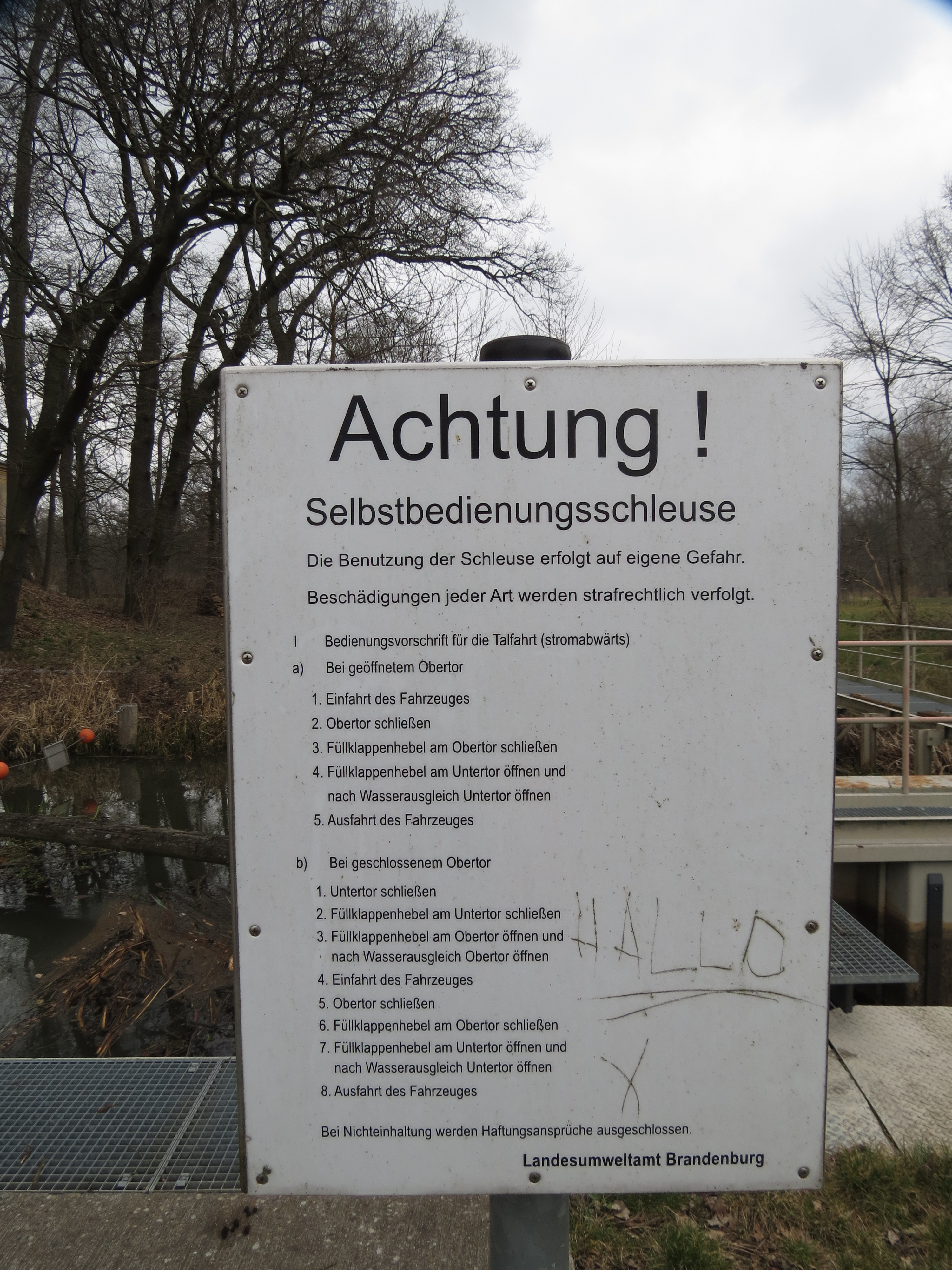 Selbstbedienungsschleuse Pretschen, Hinweistafel, Gemeinde Märkische Heide, Lkr. Oder-Spree, Brandenburg, Deutschland